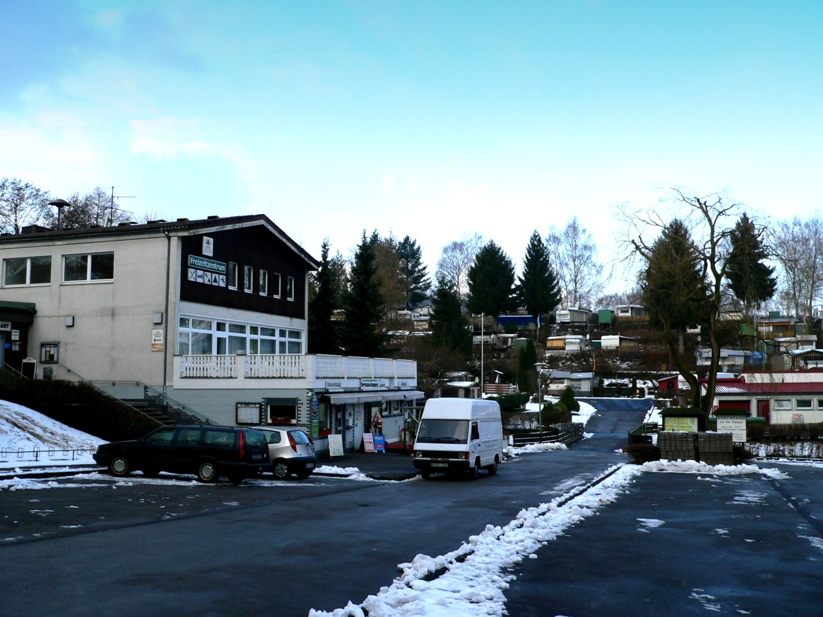 Hallenbad und Terrassencamping in Reinhardshagen-Vaake Quelle: selbst fotografiert Fotograf: presse03 11:22, 20. Feb 2006 (CET) Datum: Februar 2006